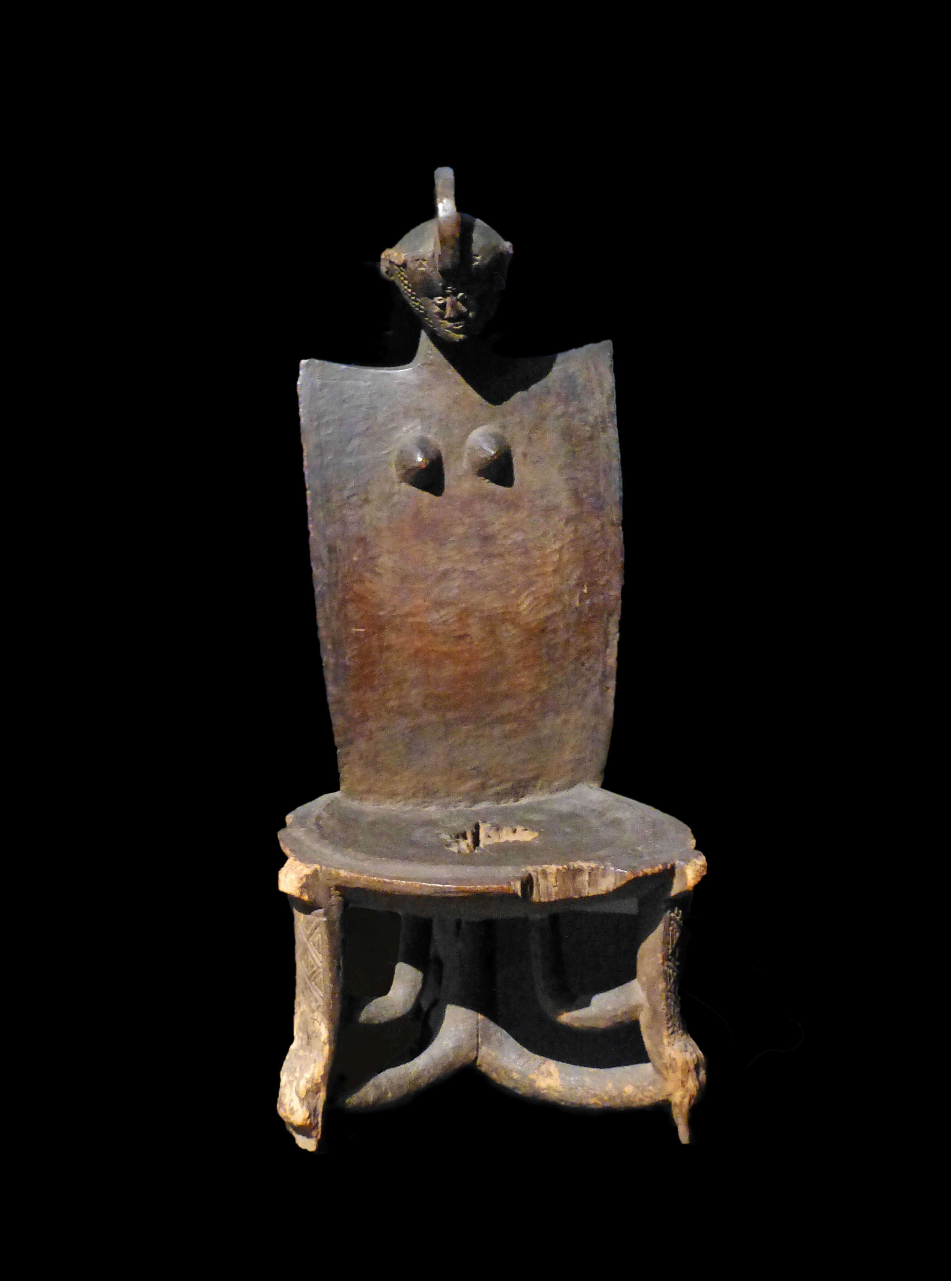 Siège de chef à haut dossier. Tanzanie. Population Kami. Fin du XIXe siècle. Lyon. Musée des Confluences